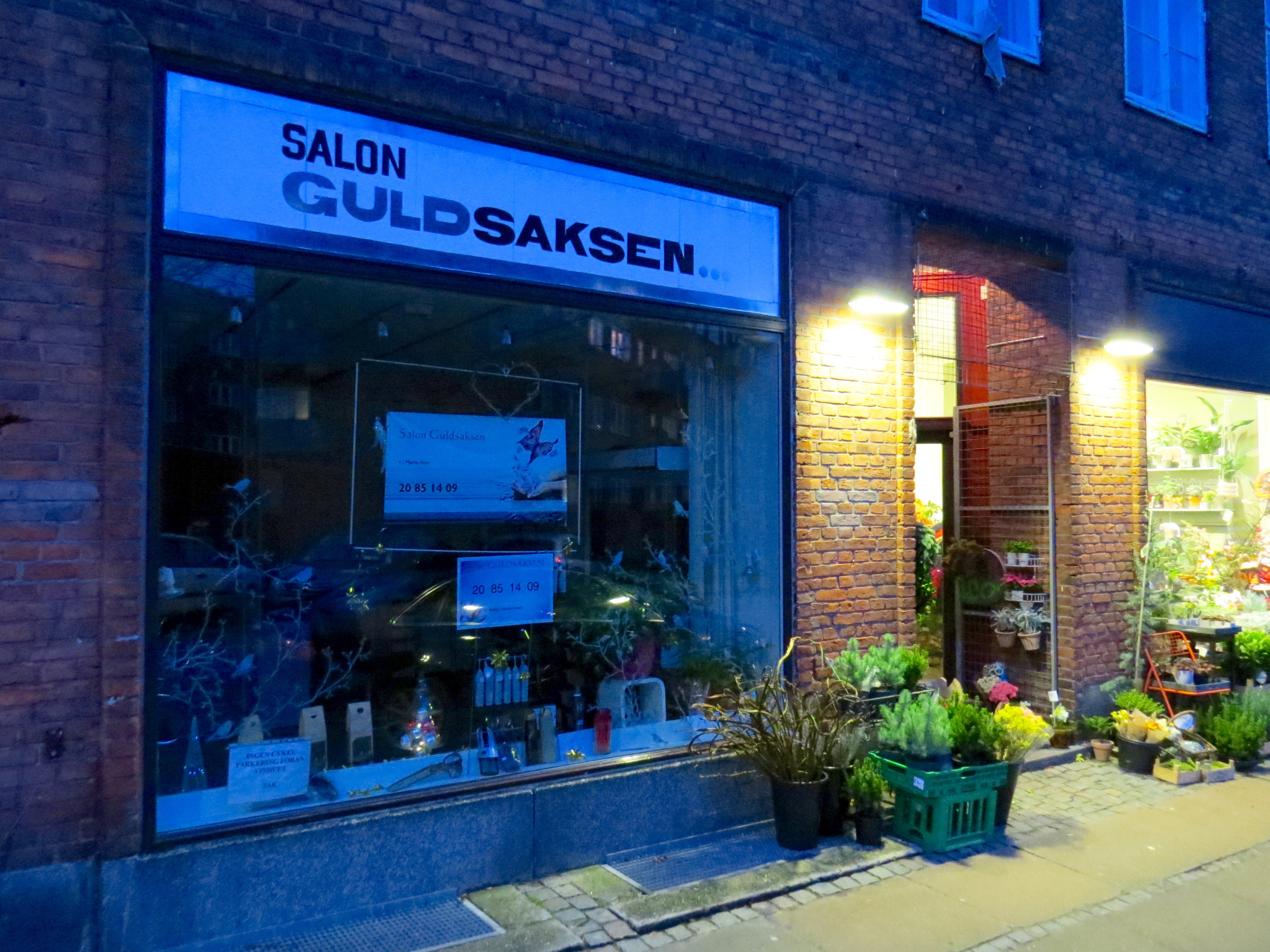 Salon Guldsaksen, Nørrebro